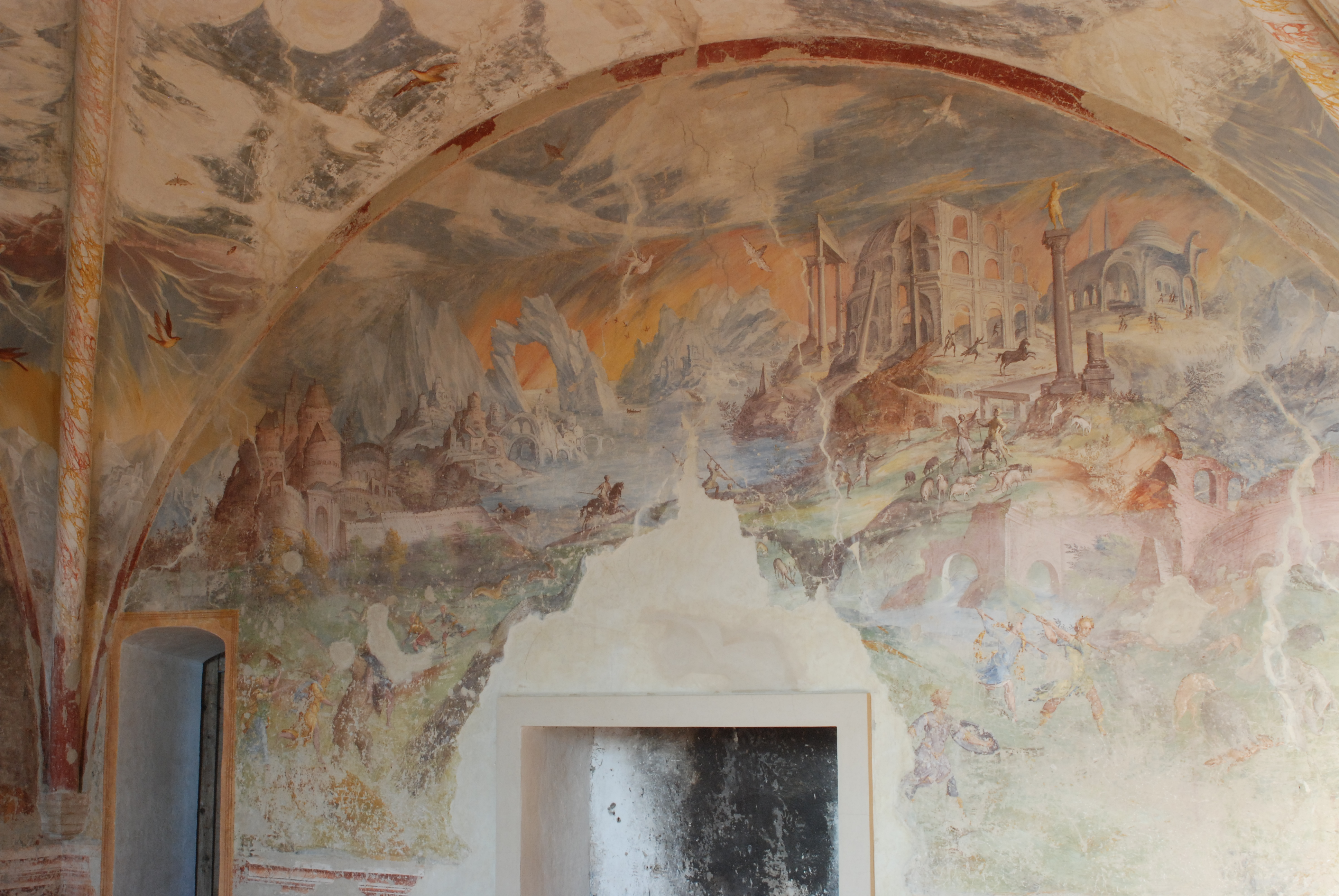 Castello di Torrechiara - MIBAC parete affrescata This is a photo of a monument which is part of cultural heritage of Italy.